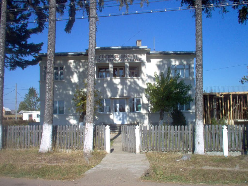 Centrul de Sanatate Ion Nistor de la Vicovu de Sus